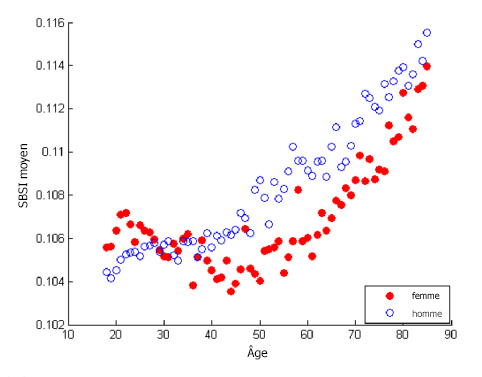 Graphique représentant l'évolution de l'indice SSBI en fonction de l'âge, par sexe.